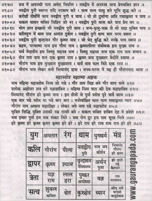 Text of the Nityananda Gauranga Nama Mahastotra (Mahatmya) in Devnagari script. Taken by Swami Gaurangapada